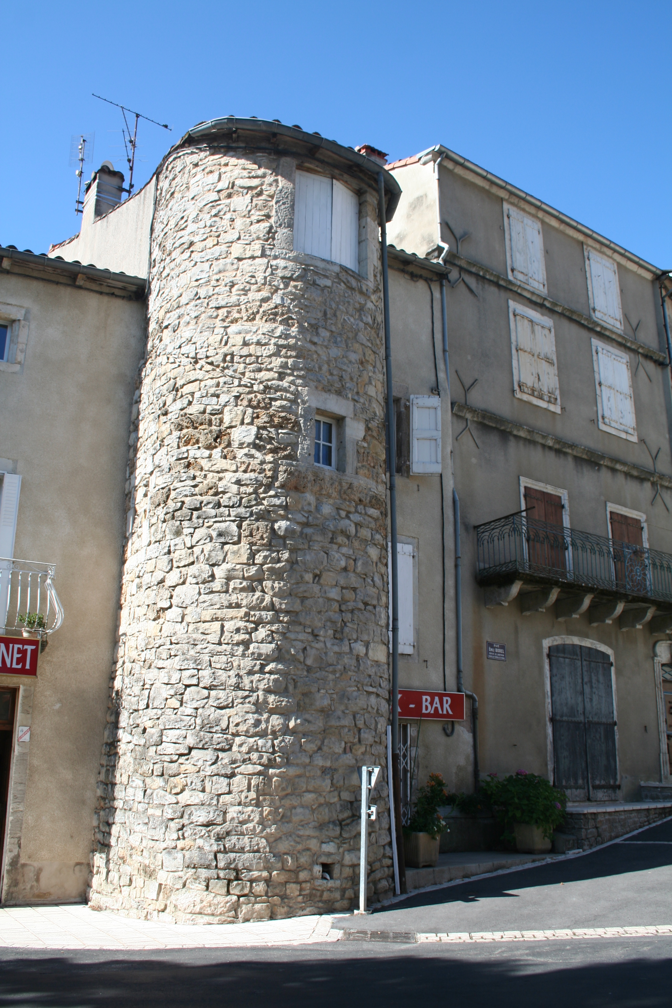 Cornus (Aveyron) - tour.